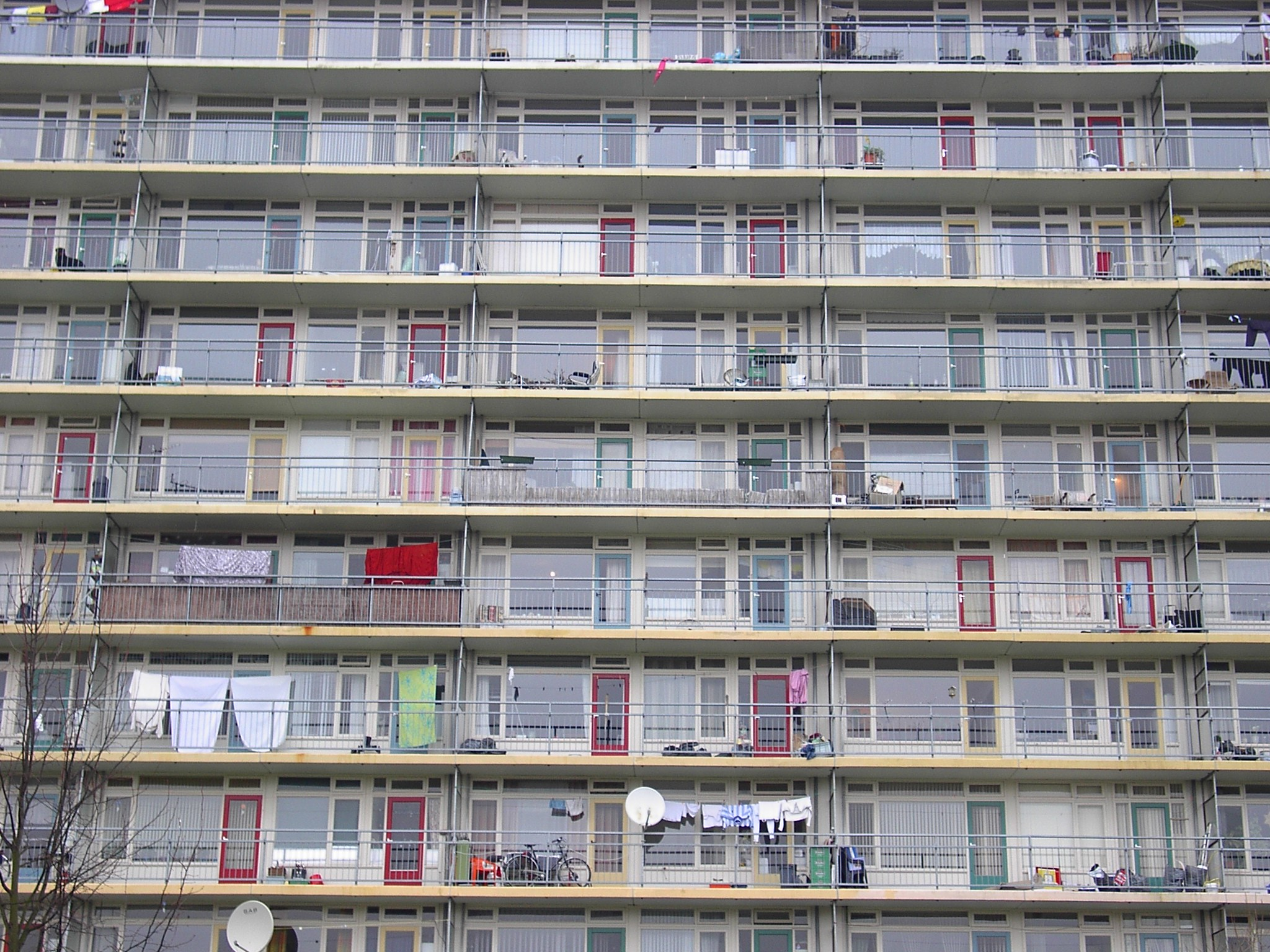 Omschrijving